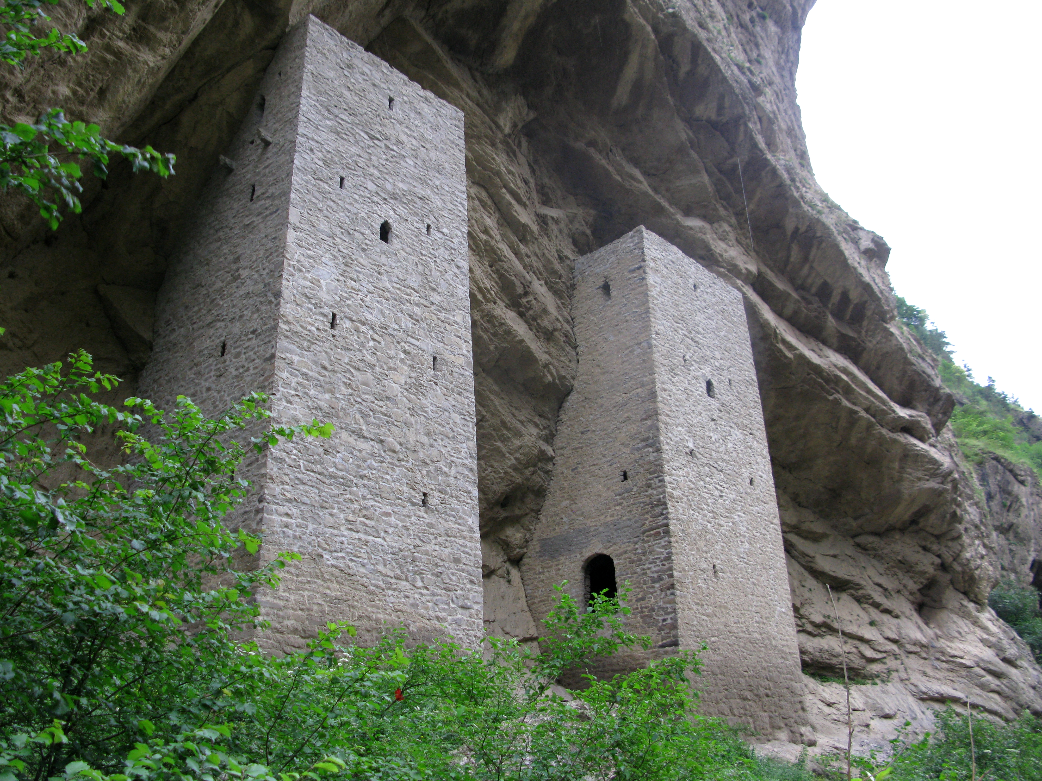 Боевые башни (Чеченская Республика, Урус-Мартан, село ушкалой)